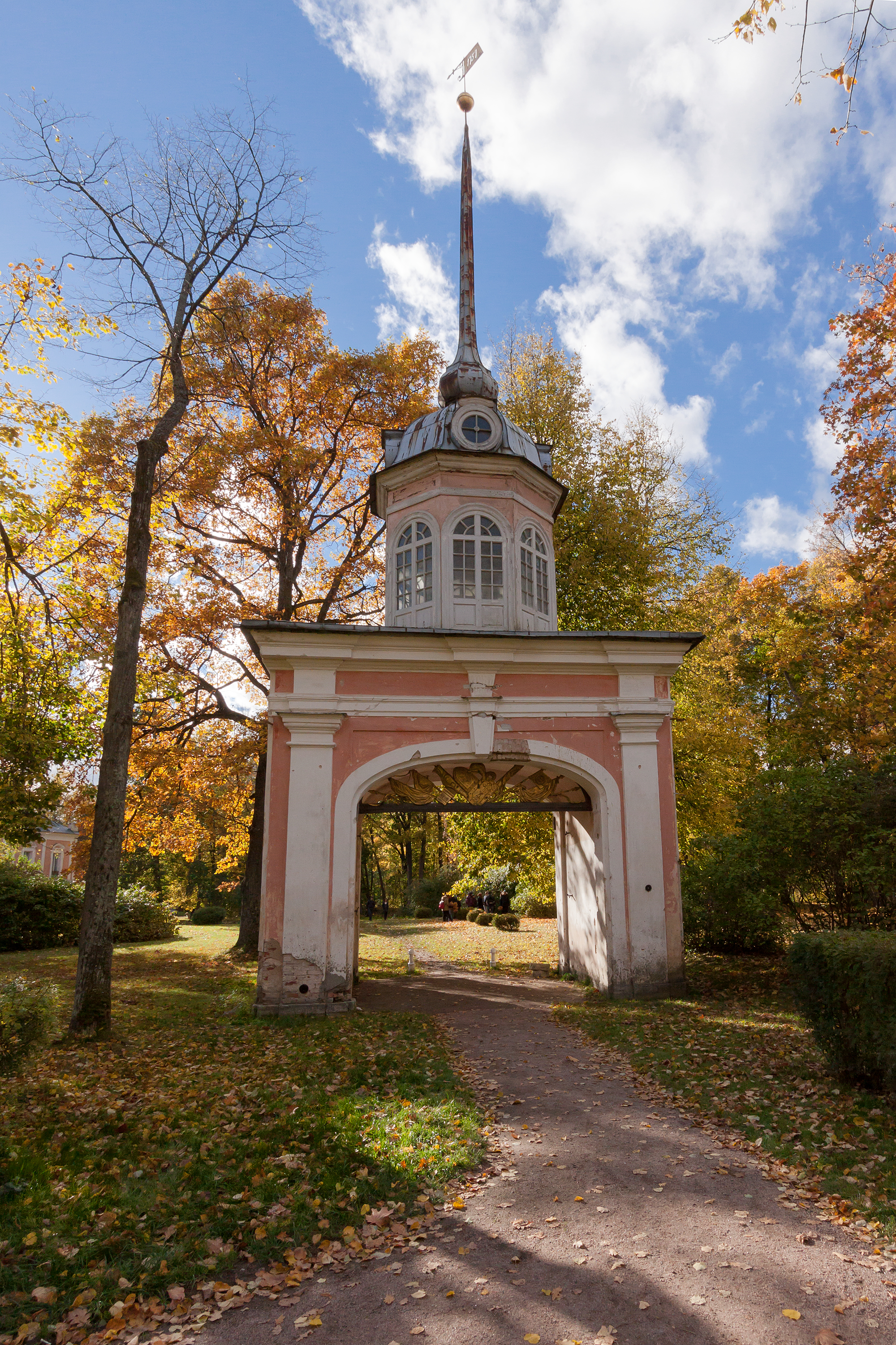 Почетные ворота крепости: Верхний парк, Ломоносов, Петродворцовый район, Санкт-Петербург